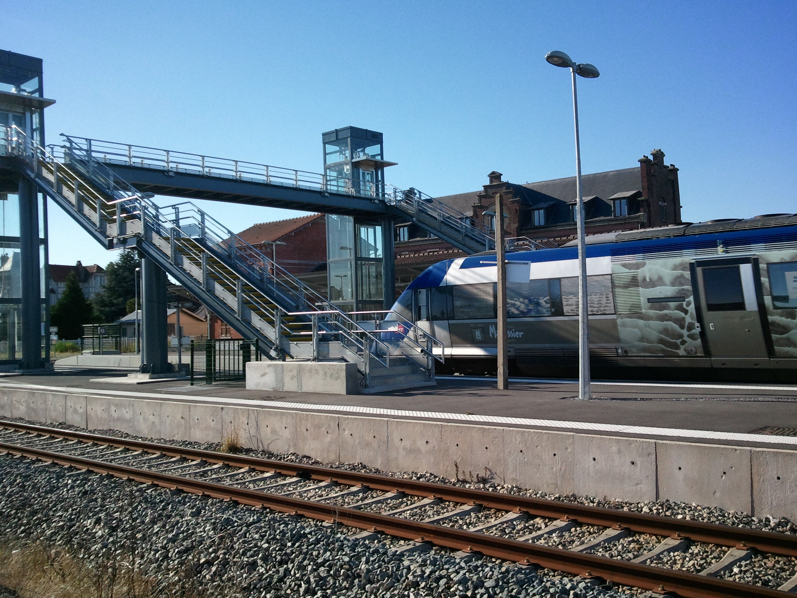 Gare de Chaulnes - La Passerelle donnant l'accesibilité PMR aux quais